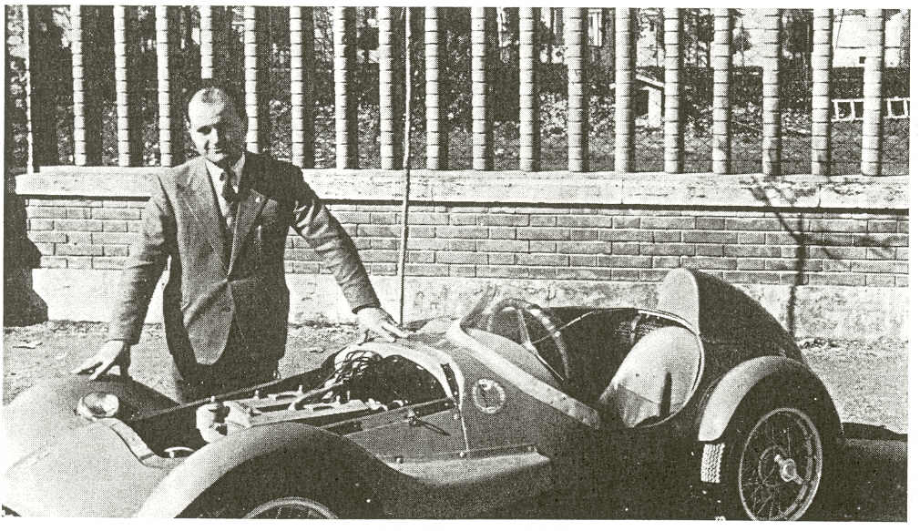 Bandini 750 sport siluro e ilario bandini tratta da Libro: Bandini (storia della vita e automobili di Ilario Bandini)